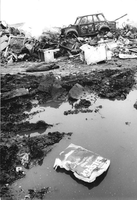 Glindow-Bliesendorf, Mülldeponie ADN-Robert Roeske 13.9.90 Bez. Potsdam: Protest- Das Neue Forum Werder und Glindow sperrte aus Gründen des Umweltschutzes von 7.00 bis 9.00 Uhr die Zugänge zur Mülldeponie Glindow-Bliesendorf. Die Protestaktion hat das Ziel, die Öffentlichkeit auf die unzulässige und hohe Belastung der Oberfläche, des Bodens und des Grundwassers aufmerksam zu machen und eine sofortige Schließung der Deponie zu erwirken.